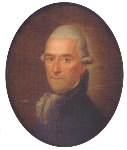 Porträt Henri Alexandre de Catt